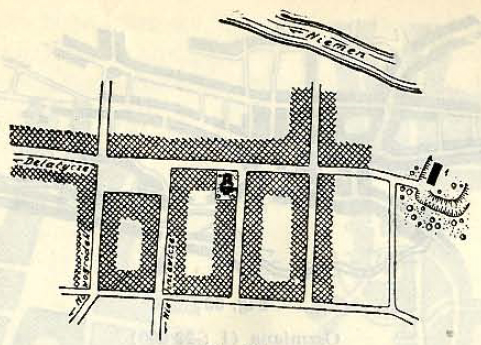 Беларуская (тарашкевіца): Любча (Lubča). Плян